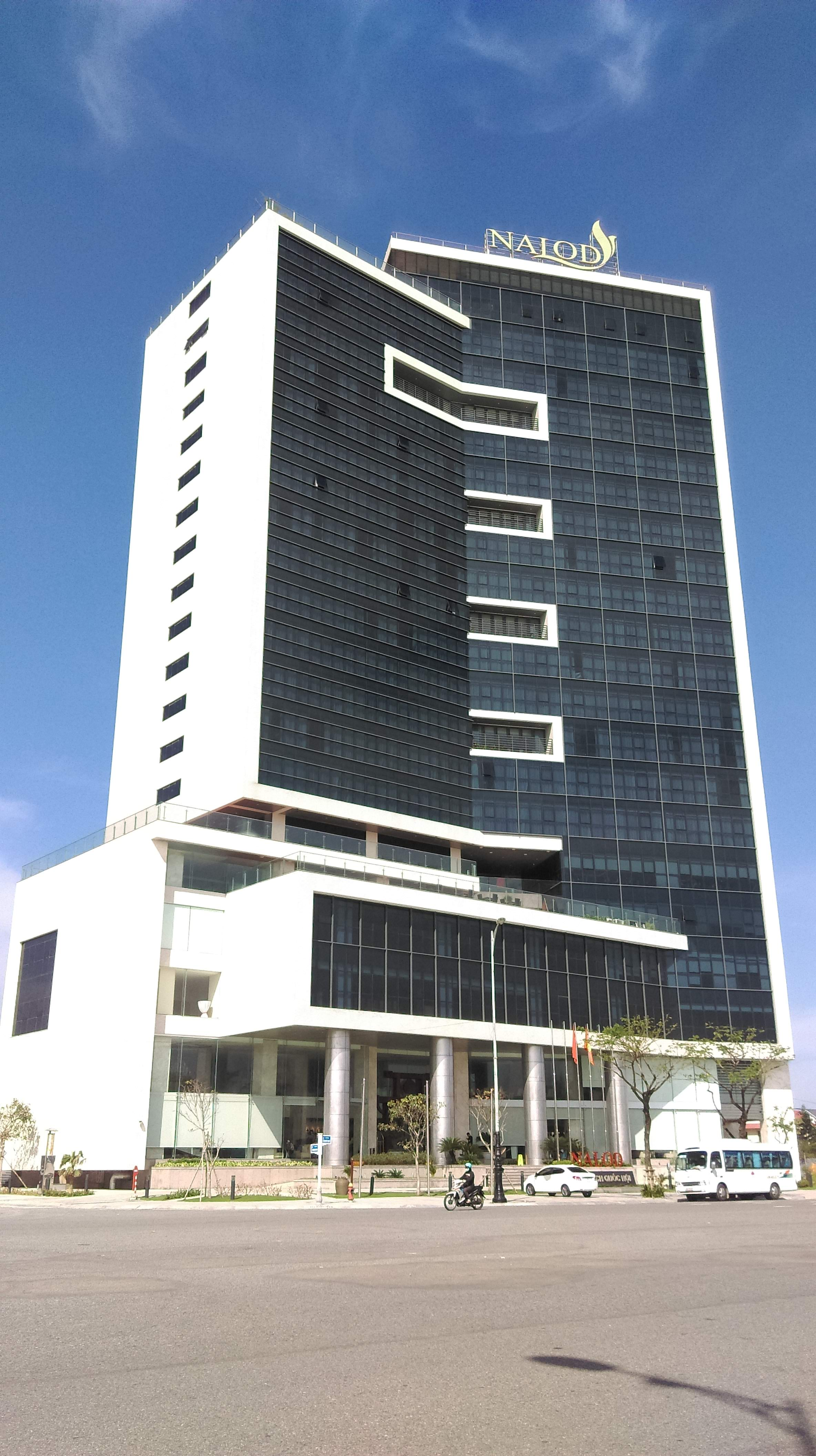 Nhà khách Quốc hội, Sơn Trà, Đà Nẵng